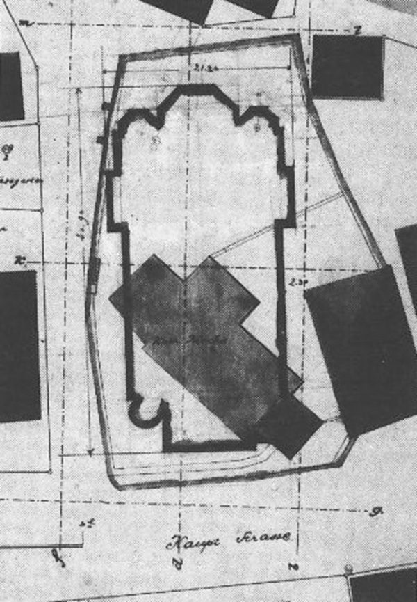 Oberkochen - Lageplan der kleineren alten (schwarz eingezeichneten) und der im Jahre 1900 erbauten größeren neoromanischen Pfarrkirche Peter und Paul. Zeichnung der Architekten Beisbarth und Früh in ihrer Beschreibung des geplanten Kirchenneubaus vom 15. Dezember 1898.